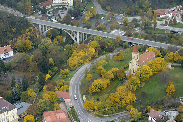 Szent István völgyhíd a levegőből